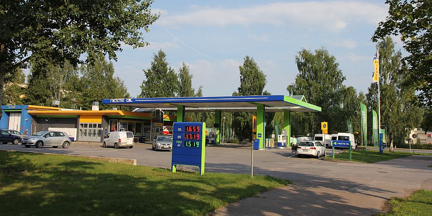 Nesteen huoltamo + K-kaupan minimarket. Vantaa, Rajatorppa. Huom: Muista säilyttää viittaus kuvaajaan, mikäli käytät kuvaa.